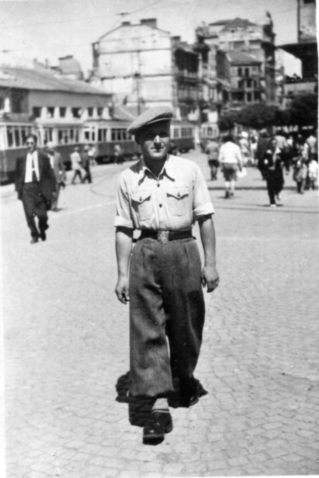 Спас Антонов в центъра на София, 1948 г.